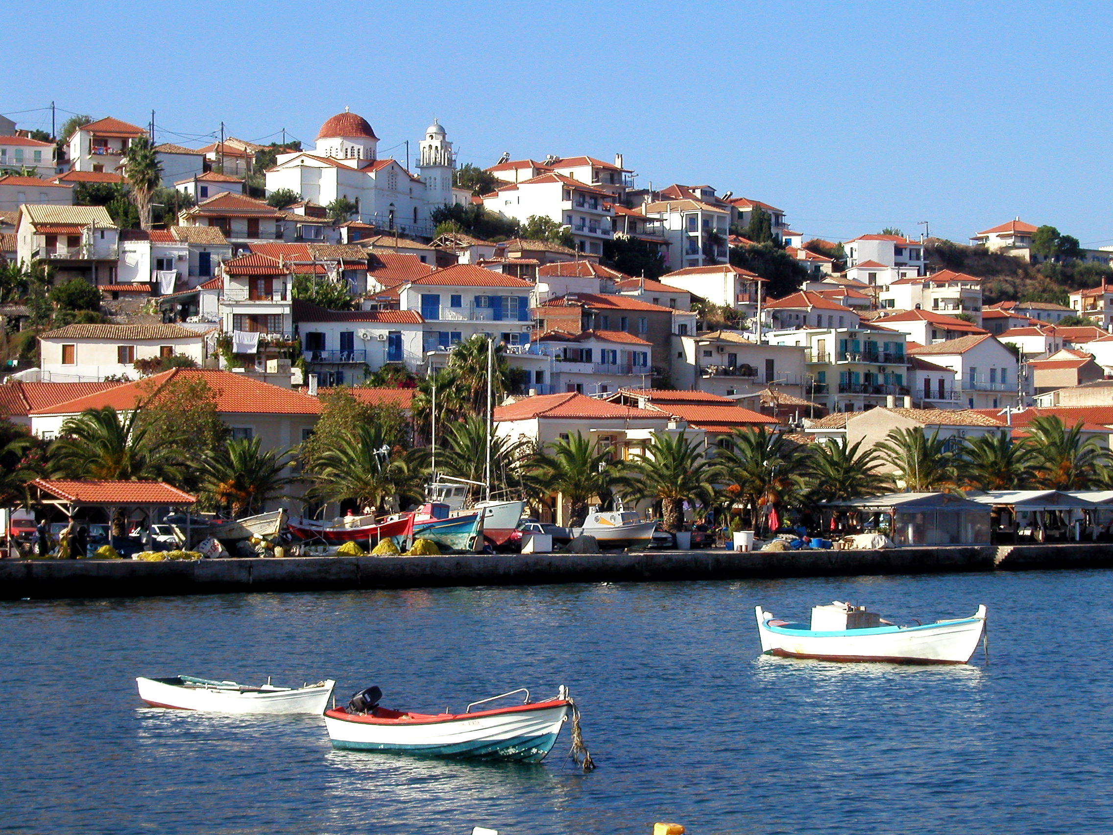 Koroni, Griechenland